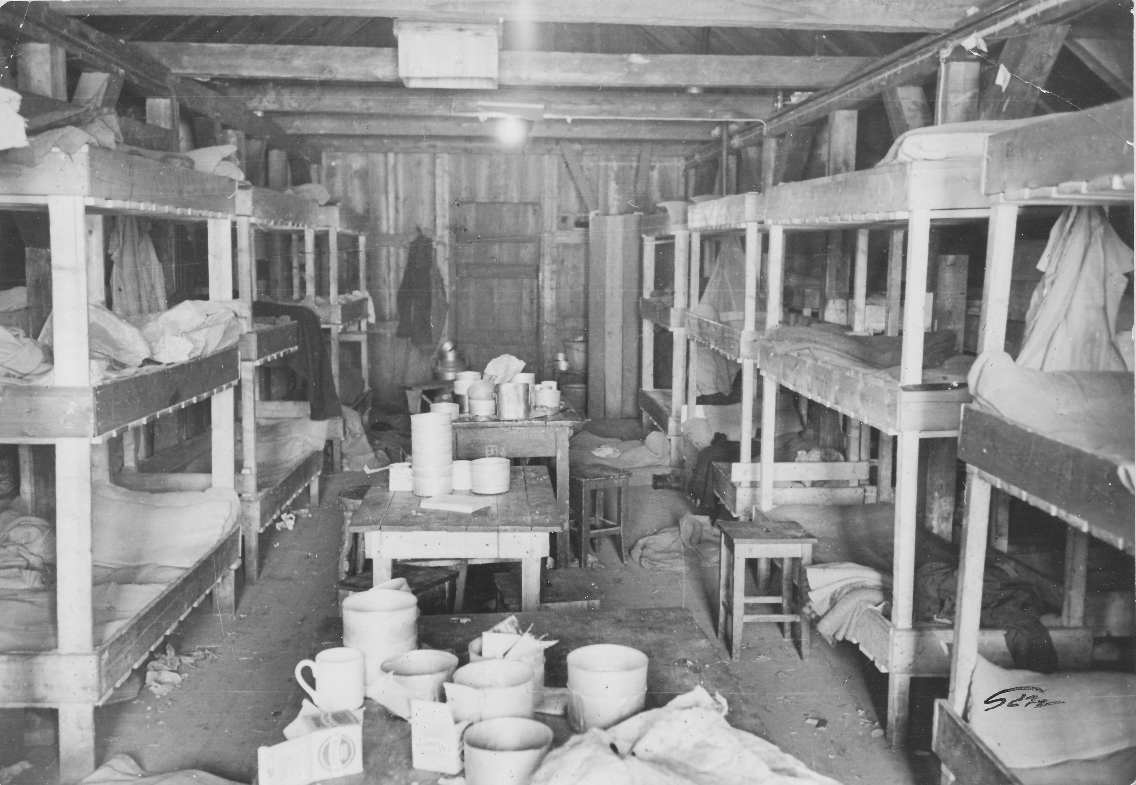 Fotograf: Schrøder